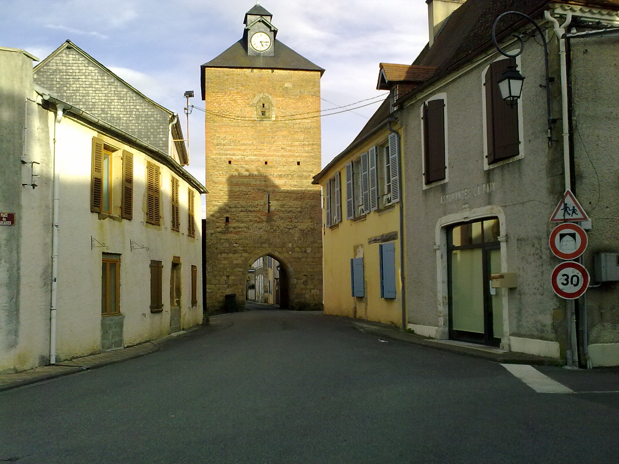 Passage étroit de Lembeye . C'est remarquable depuis la place centrale .